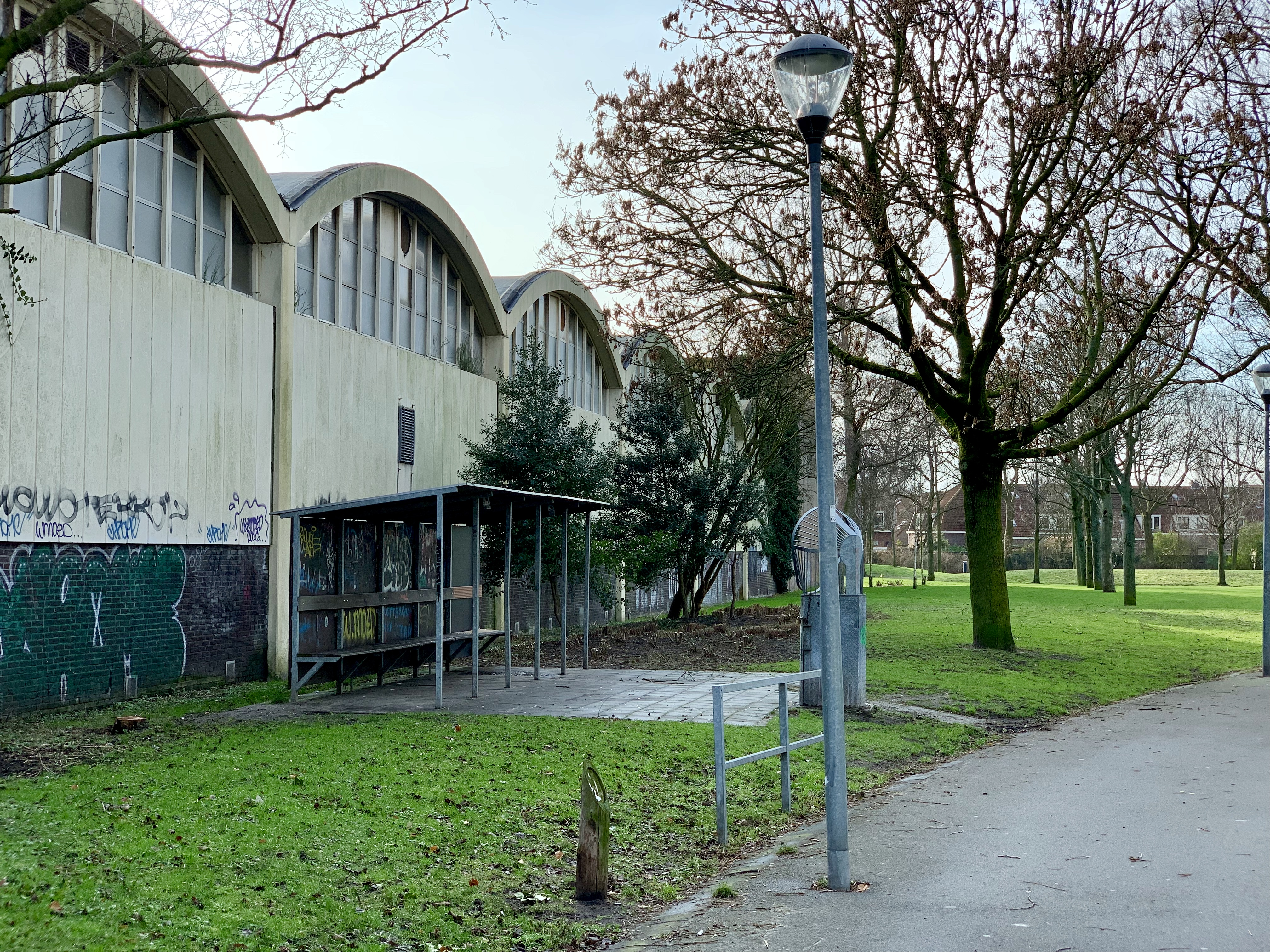 Achterkant van Vermaats broodfabriek in februari 2019